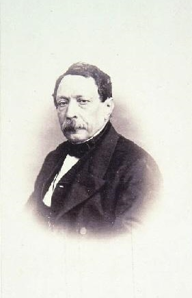 Alejandro Oliván y Borruel, fotografía de J. Laurent, Museo de Historia de Madrid